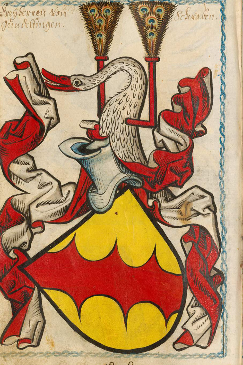 Scheibler'sches Wappenbuch, älterer Teil Gundelfingen